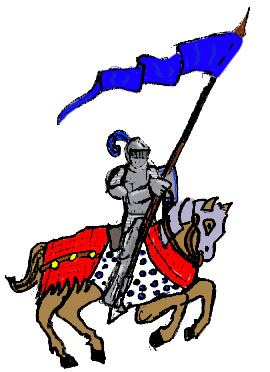 Dibujo de un caballero medieval